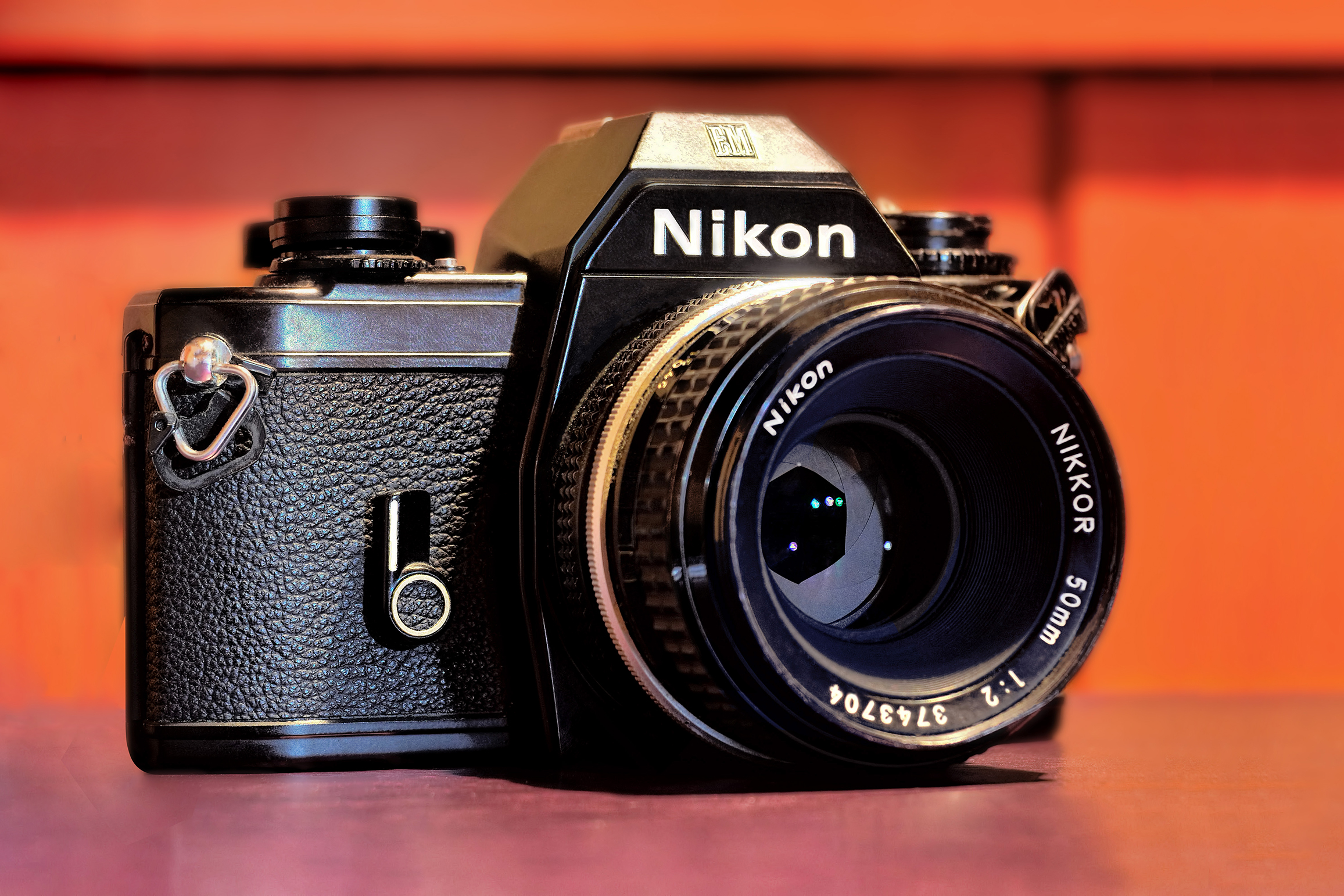 Nikon EM with nikkor 50mm f/2